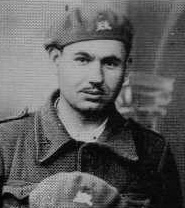 Došli su u Španiju iz Praga, gde su studirali, tokom 1937. godine. Svi osim Lazara Latinovića su poginuli u NOR-u. Krsmanović, Pavlović i Kovačević su postali Narodni heroji Jugoslavije. Latinović je posle rata bio ugledan jugoslovenski diplomata. Od 1999. do svoje smrti 2006. bio je predsednik Udruženja španskih boraca